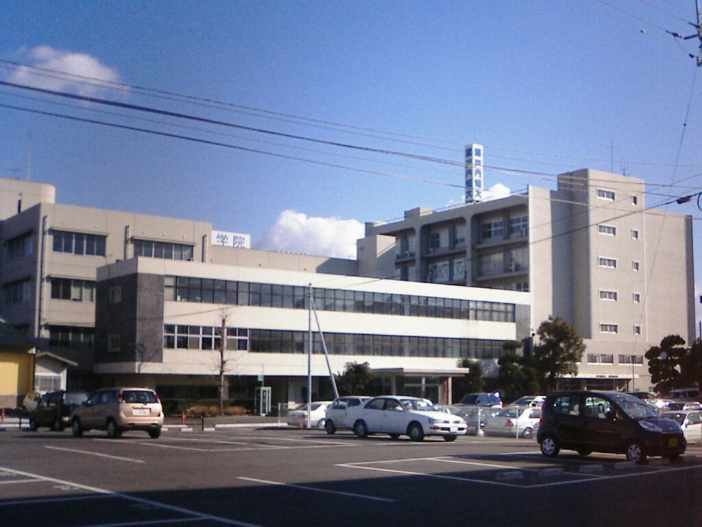 瀬戸内短期大学 - 日本国香川県三豊市にある短期大学。